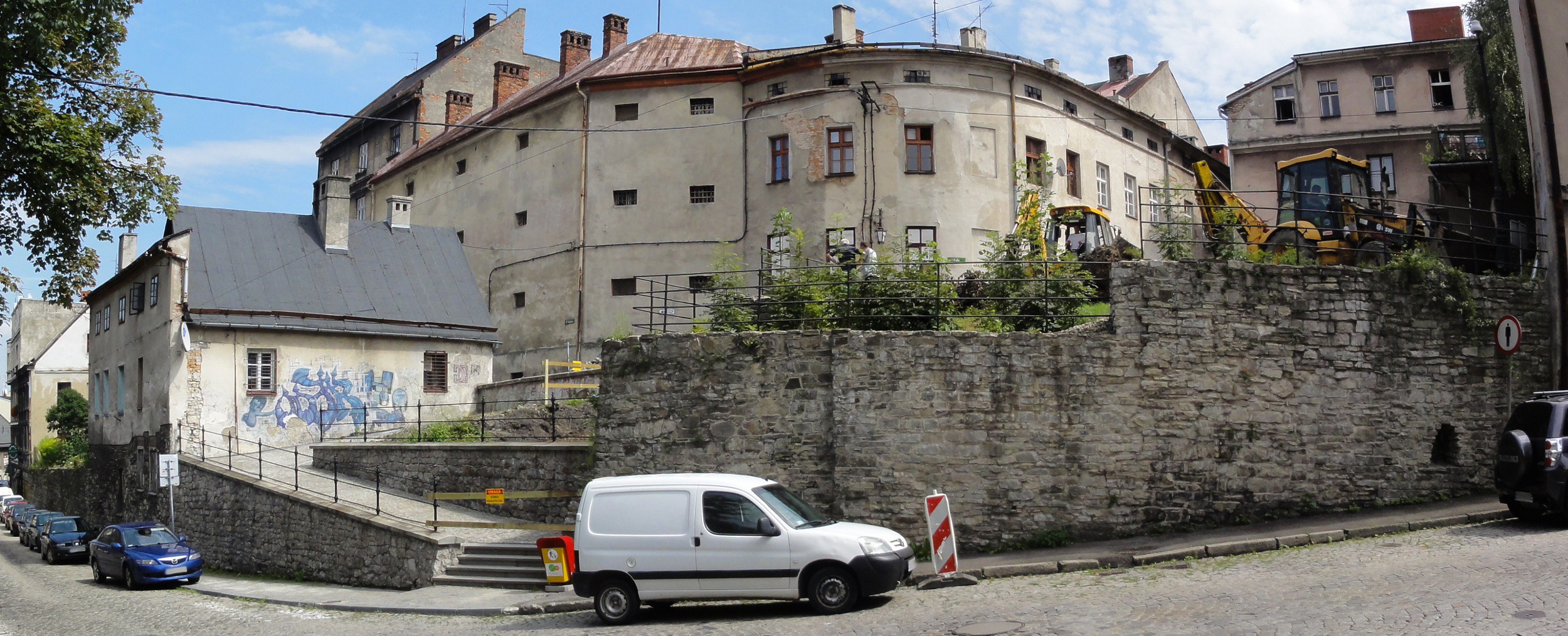 Pozostałości murów miejskich w Bielsku, na ul. Orkana